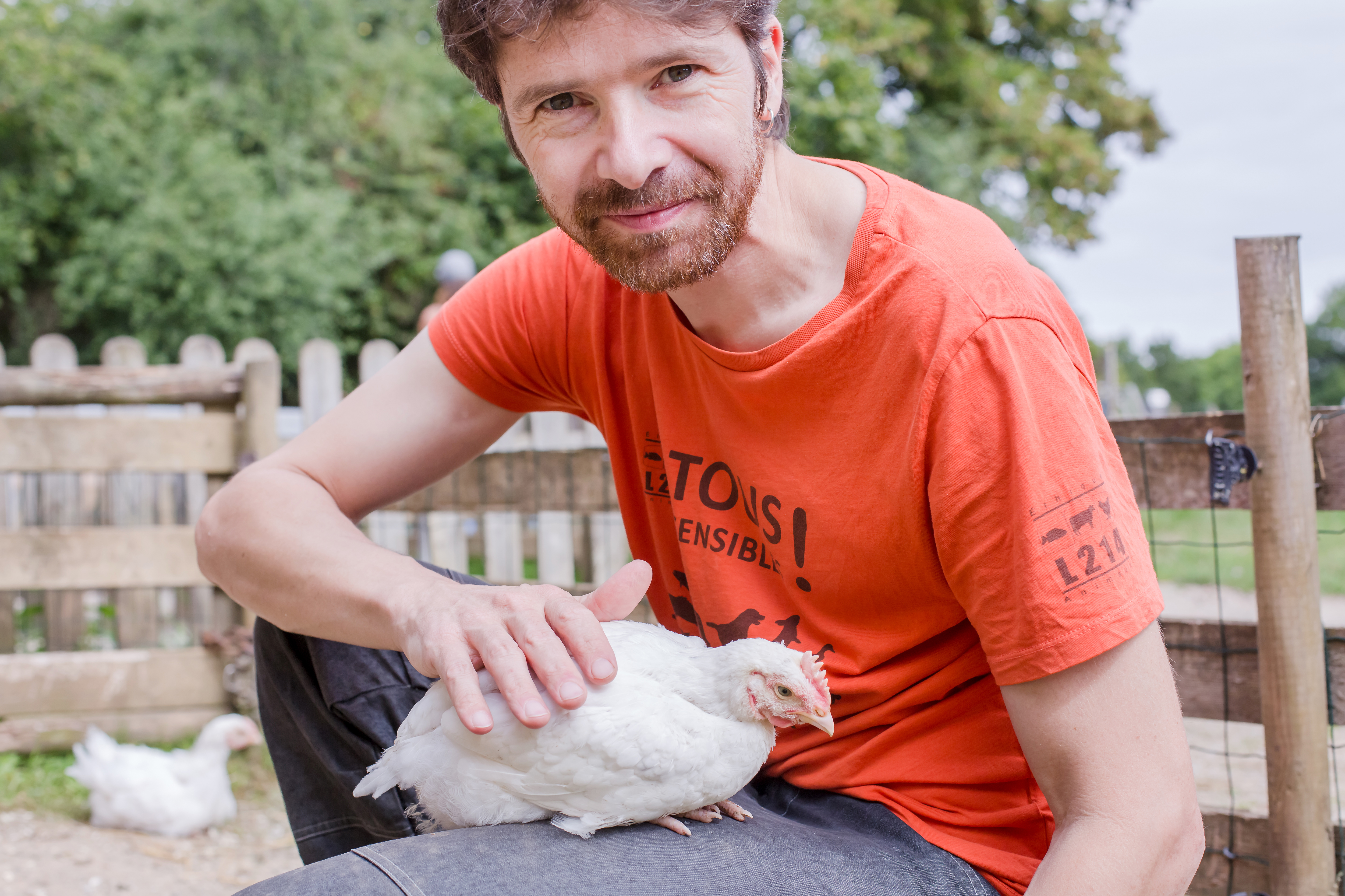 Sebastien Arsac lors d'un sauvetage de poulets en Juillet 2017